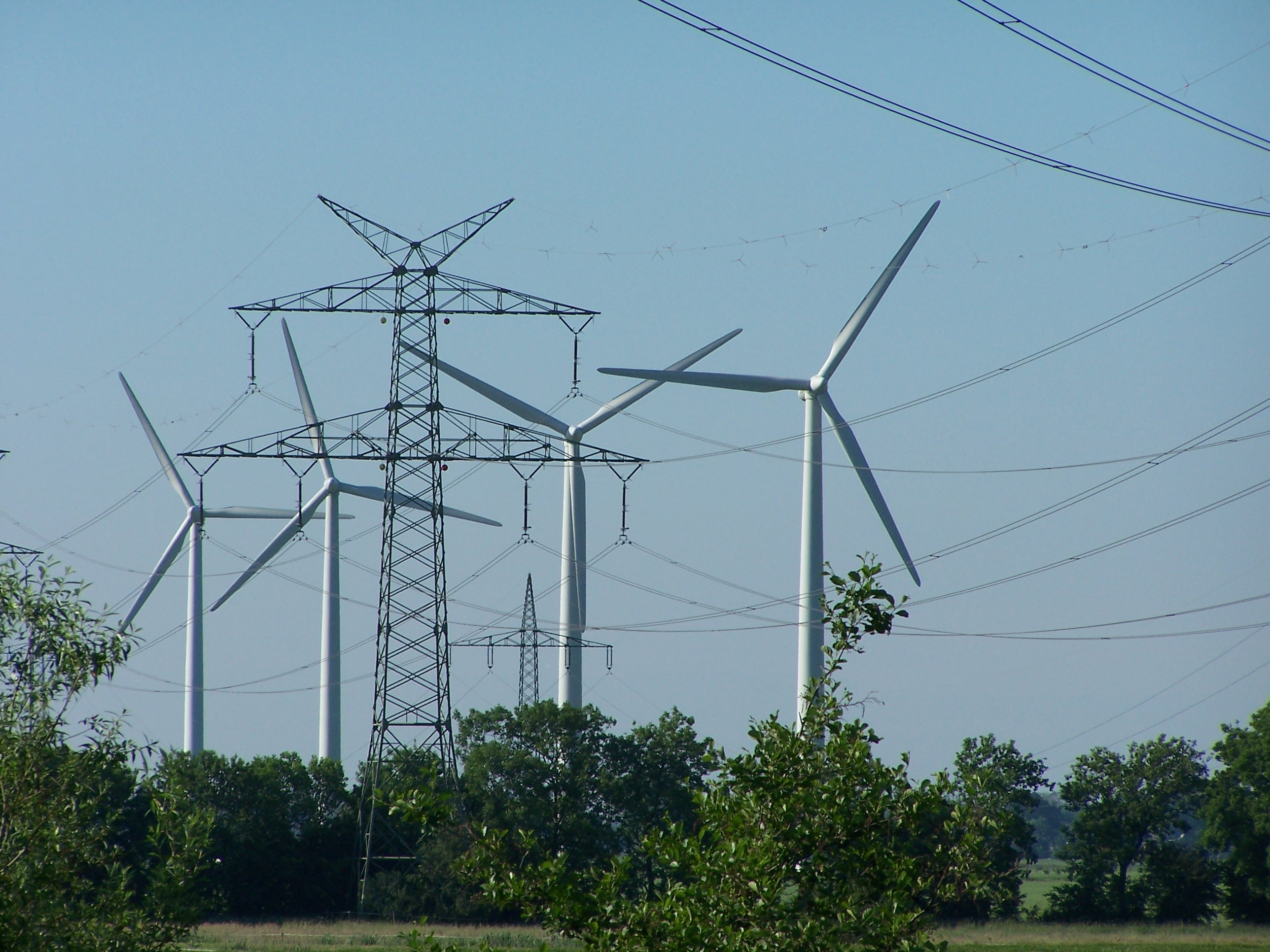 Strommasten und Windpark, östlich (?) von Hamburg – vorne Höchstspannungsleitung (380 oder 220 kV, mit Vogelschutzmarkern), dahinter Bahnstromleitung und 4 Windkraftanlagen